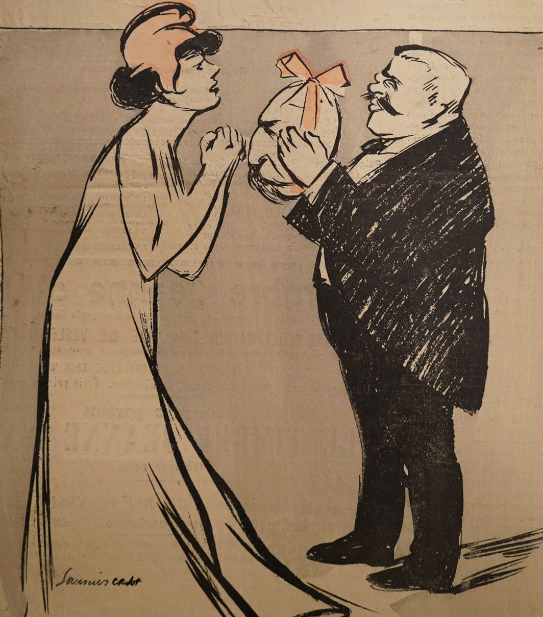 issu du journal l'étrille dans la bibliothèque de Reims.